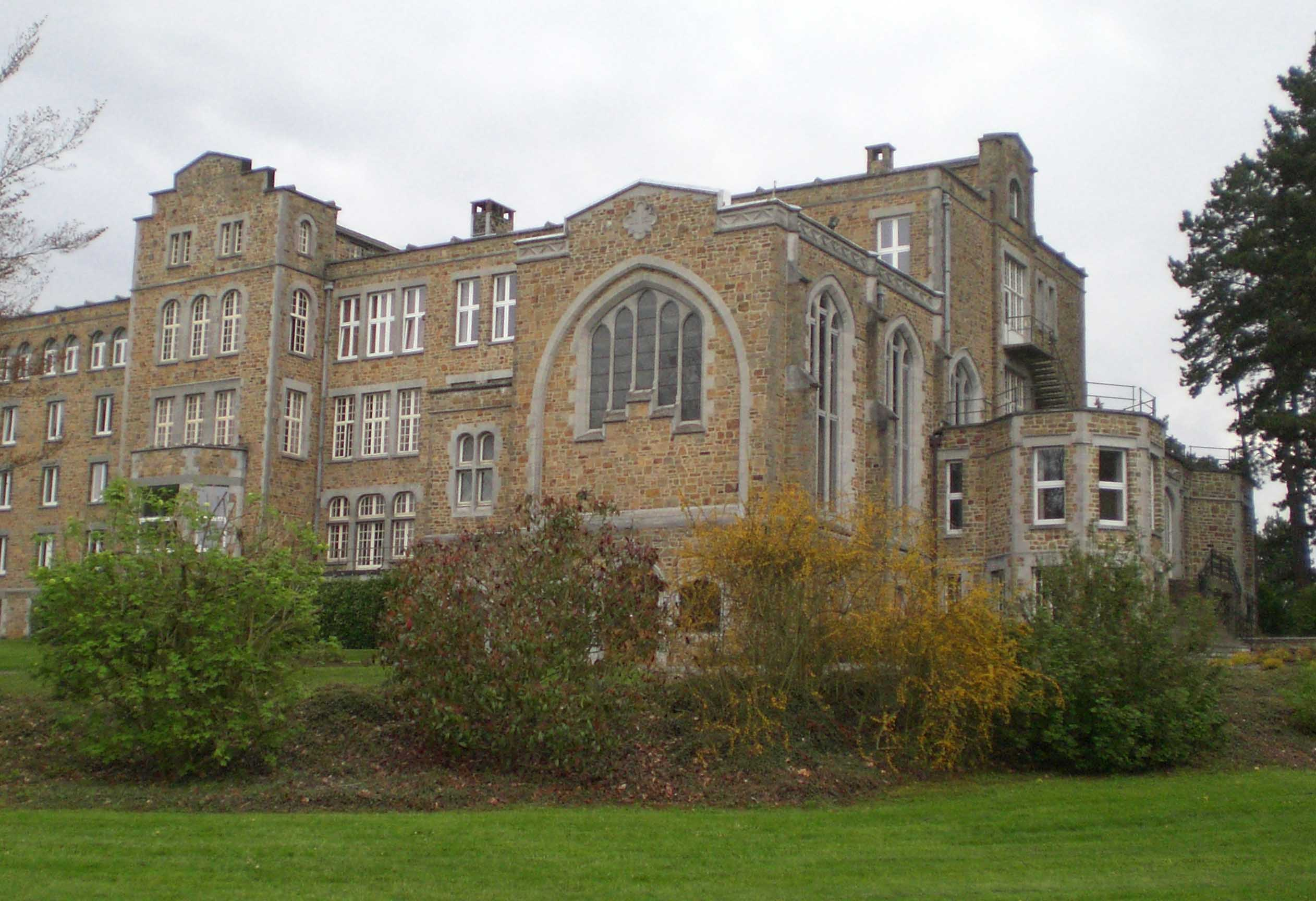 Centre spirituel ignatien "La Pairelle", Wépion (Belgique). Extérieur